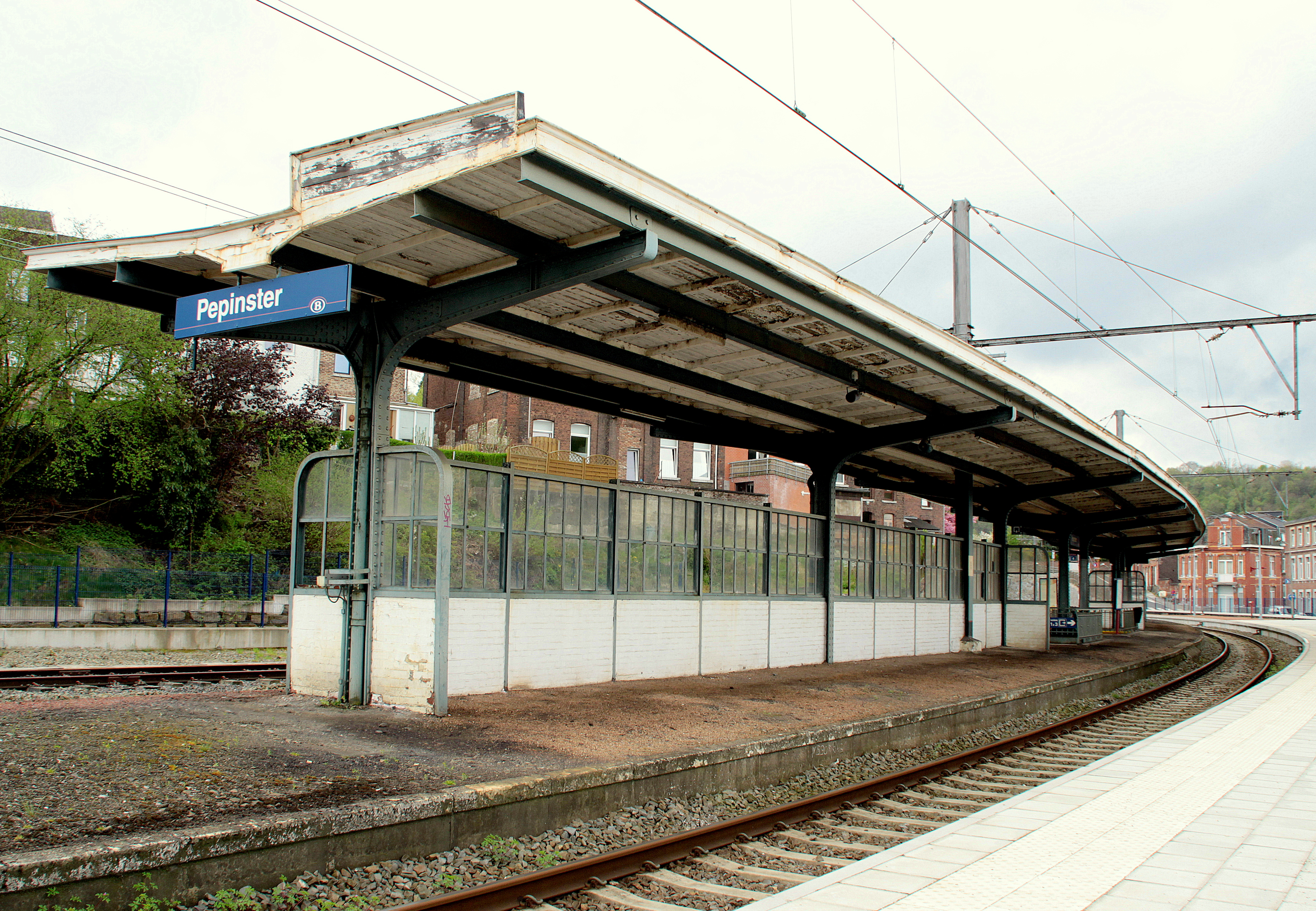 Pepinster Gare le quai vers Spa